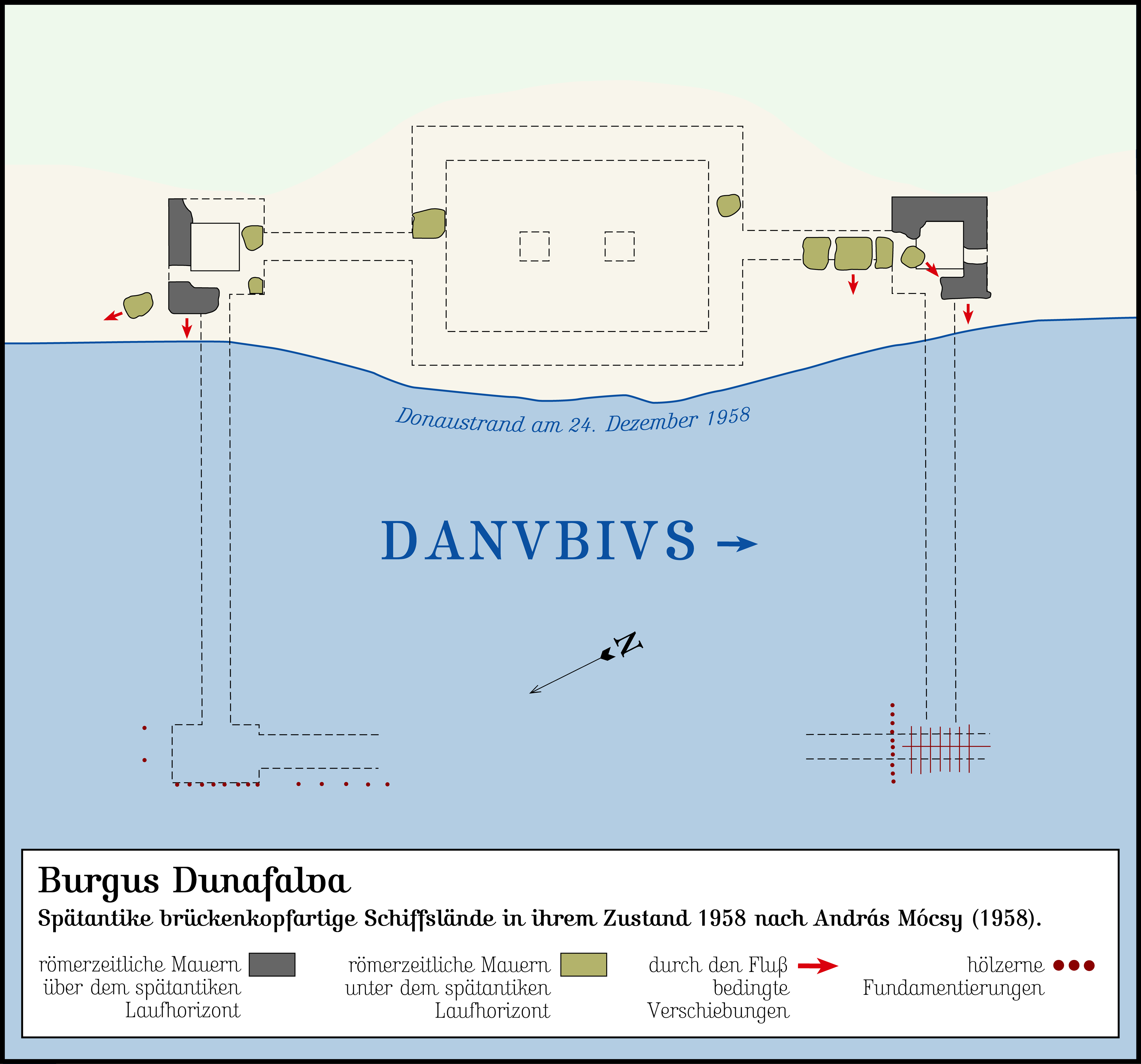 Die spätantike brückenkopfartige Schiffslände von Dunafalva am östlichen Donauufer in Südungarn nach der Bestandsaufnahme 1958 und Zuhilfenahme der älteren Forschungen von Ferenc Halász u.a. Erstveröffentlichung: András Mócsy: Die spätrömische Schiffslände in Contra Florentiam. Folia Archeologica. Bd. 10. Népművelési Propaganda Iroda, Budapest 1958. Der Flußsaum wurde ergänzt durch Angaben aus: Zsolt Visy: Der pannonische Limes in Ungarn. Konrad Theiss Verlag, Stuttgart 1988, ISBN 3806204888. S. 124.